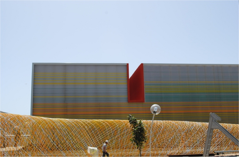 Auditorio y Palacio de Congresos de Cartagena 'El Batel'.